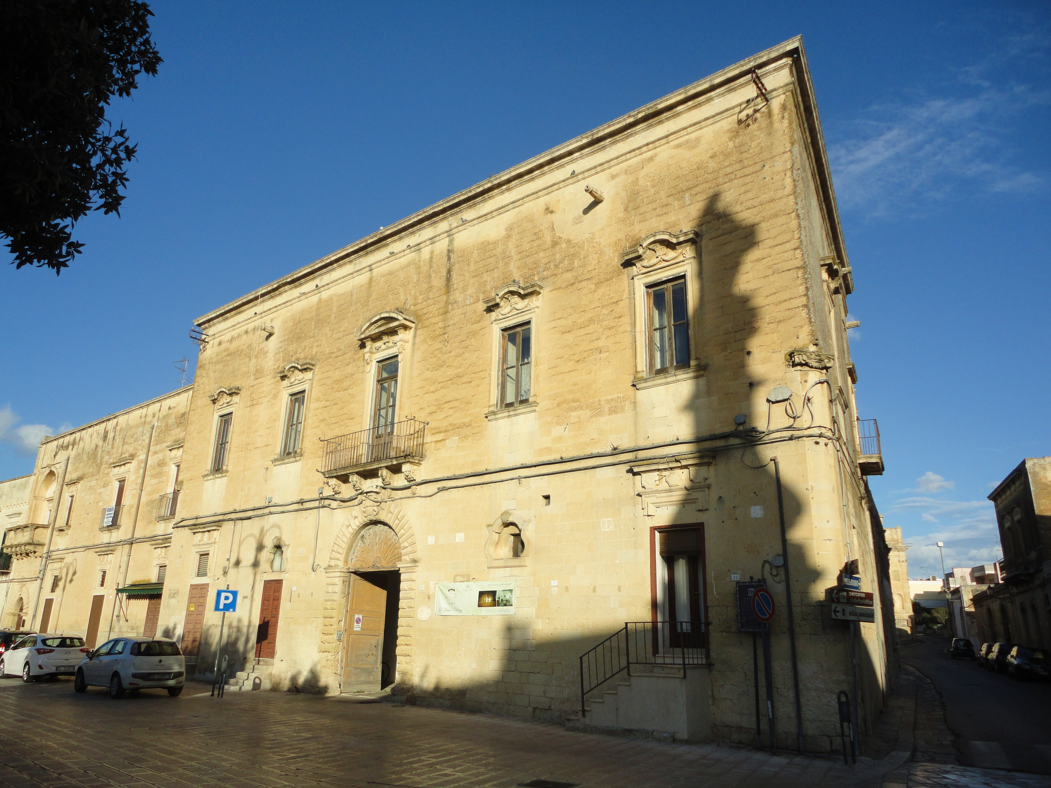 Palazzo Baronale di Vernole, Lecce